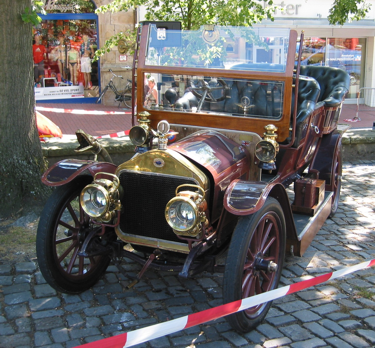 Wolseley-Siddeley 1908